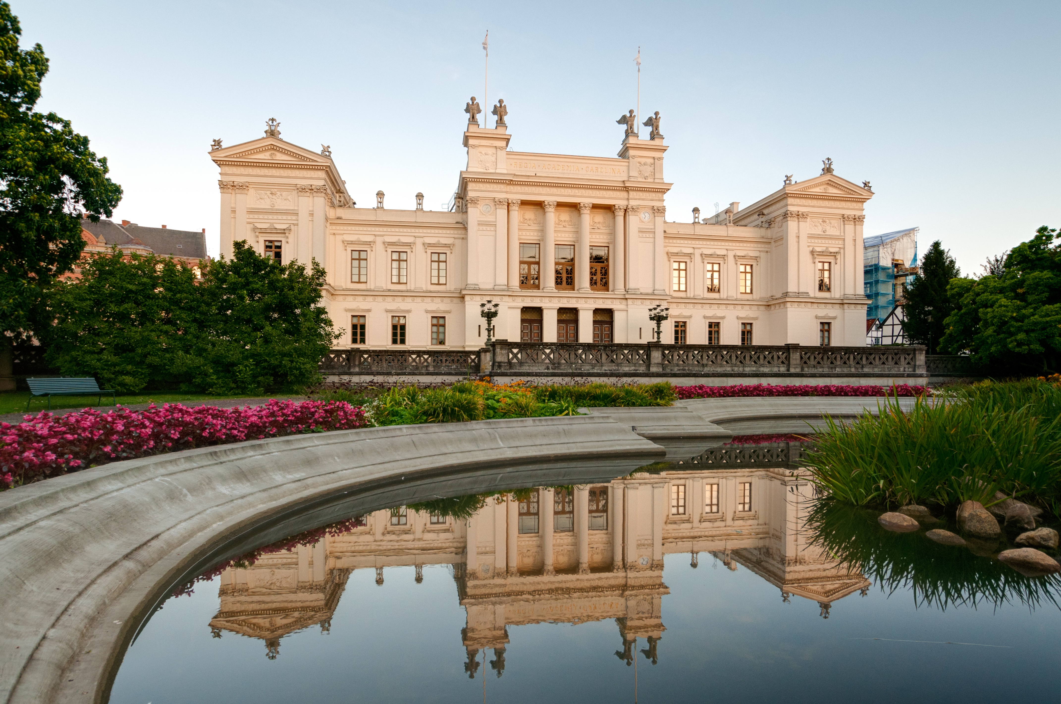 Huvudfasaden på Lunds universitetshus med reflektion i fontänen.